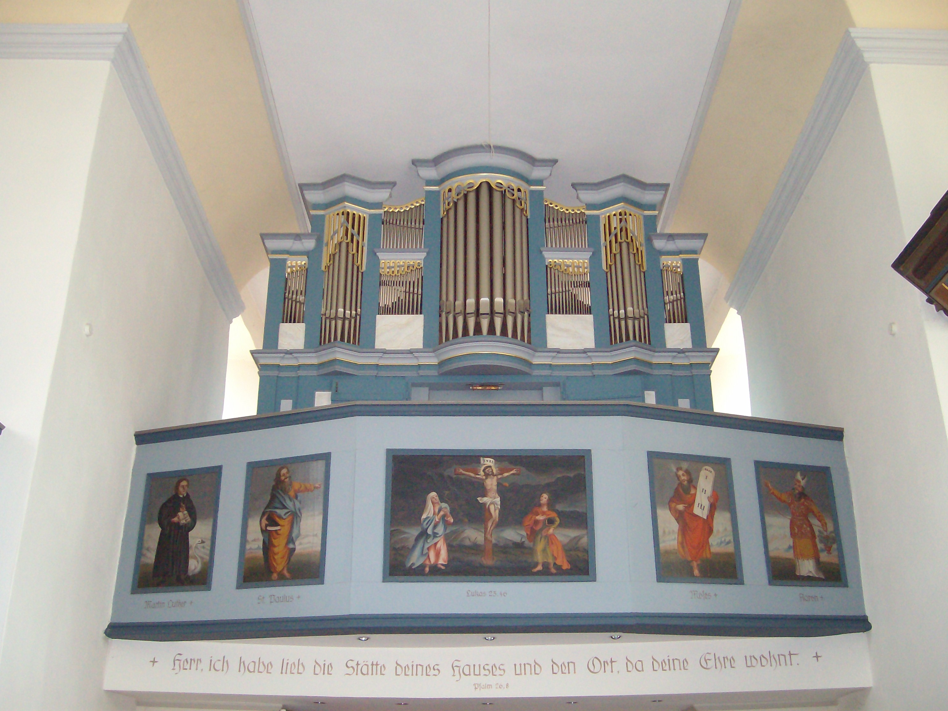 Orgel der Evangelischen Kirche Wetterfeld, Laubach, Landkreis Gießen, Hessen, Deutschland